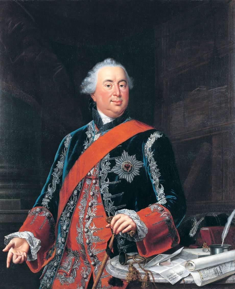 Porträt des preußischen Generalpostmeisters Gustav Adolph Reichsgraf von Gotter (1692-1762)